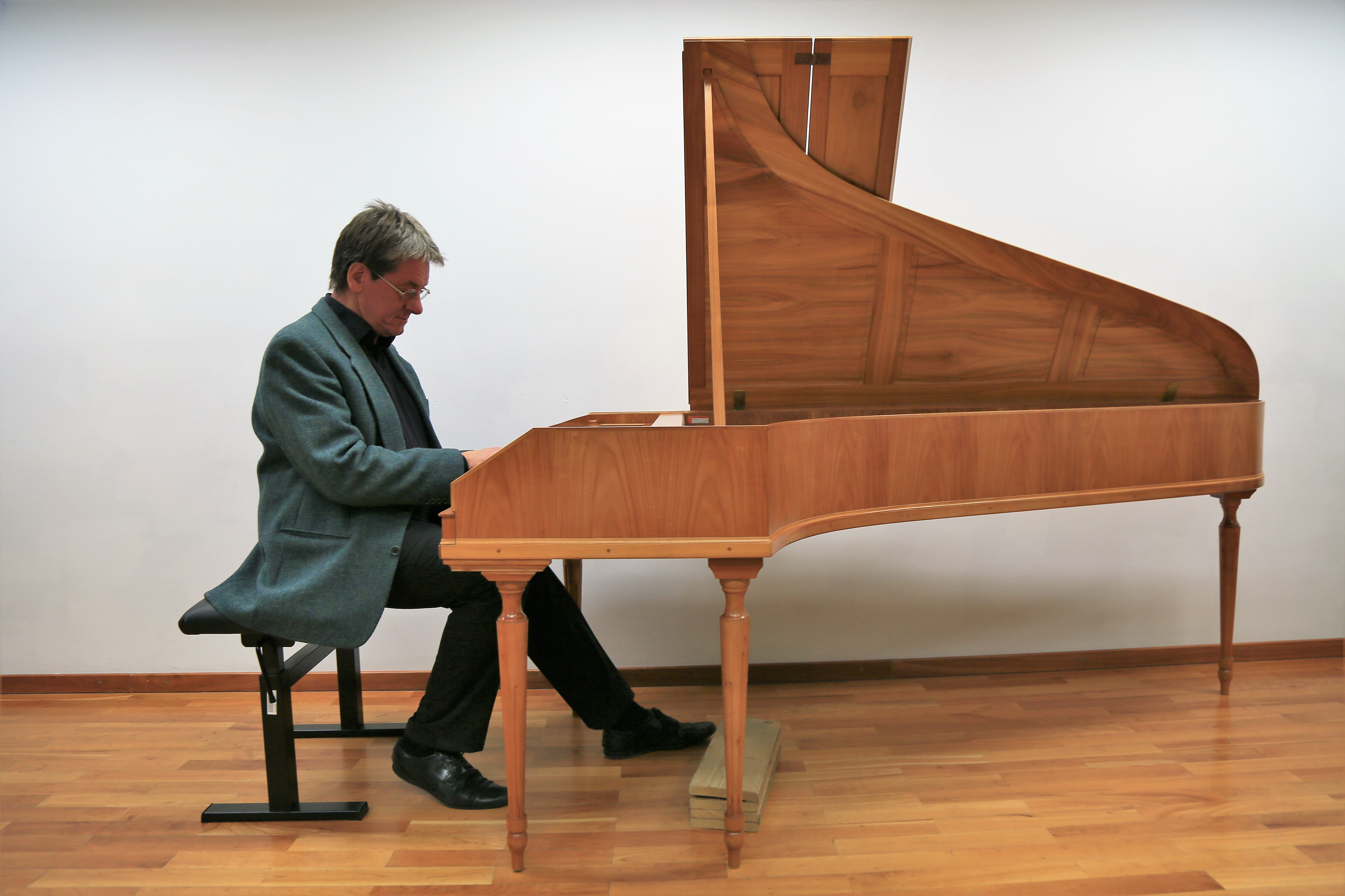 Wolfgang Brunner spielt im Rahmen der WAF-on-Tour-Veranstaltung Salzburger Orgellandschaft eine Hörprobe am Klavier